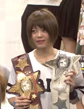 2017.7.4 スターダム記者会見